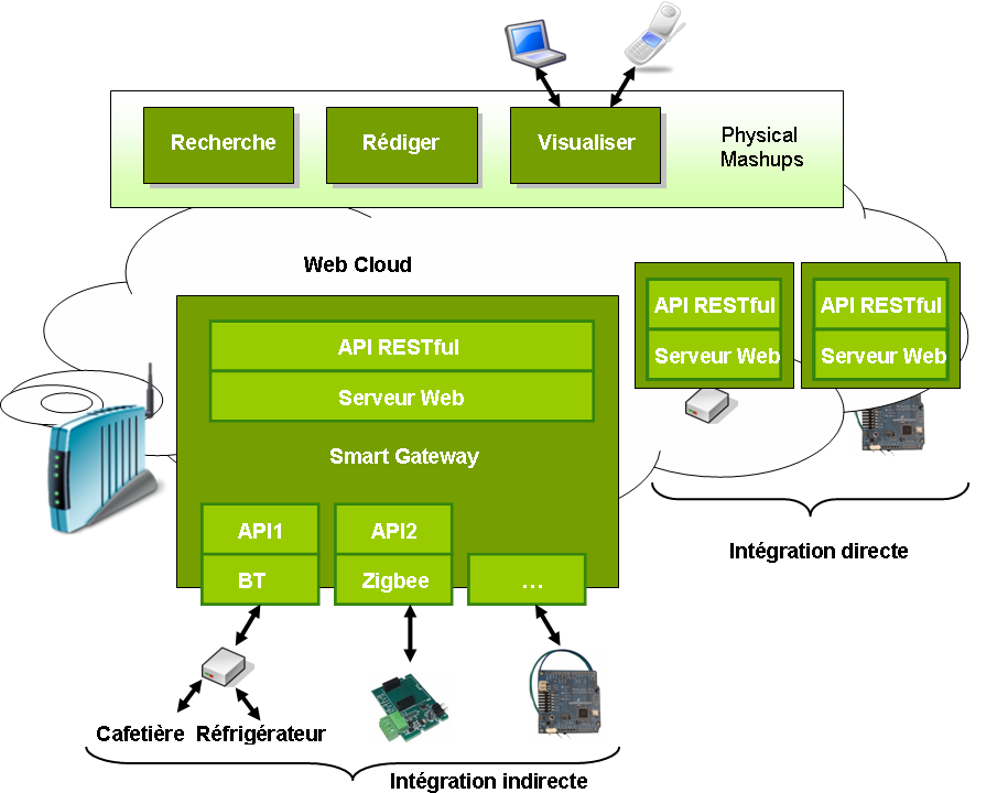 Schéma smart gateway